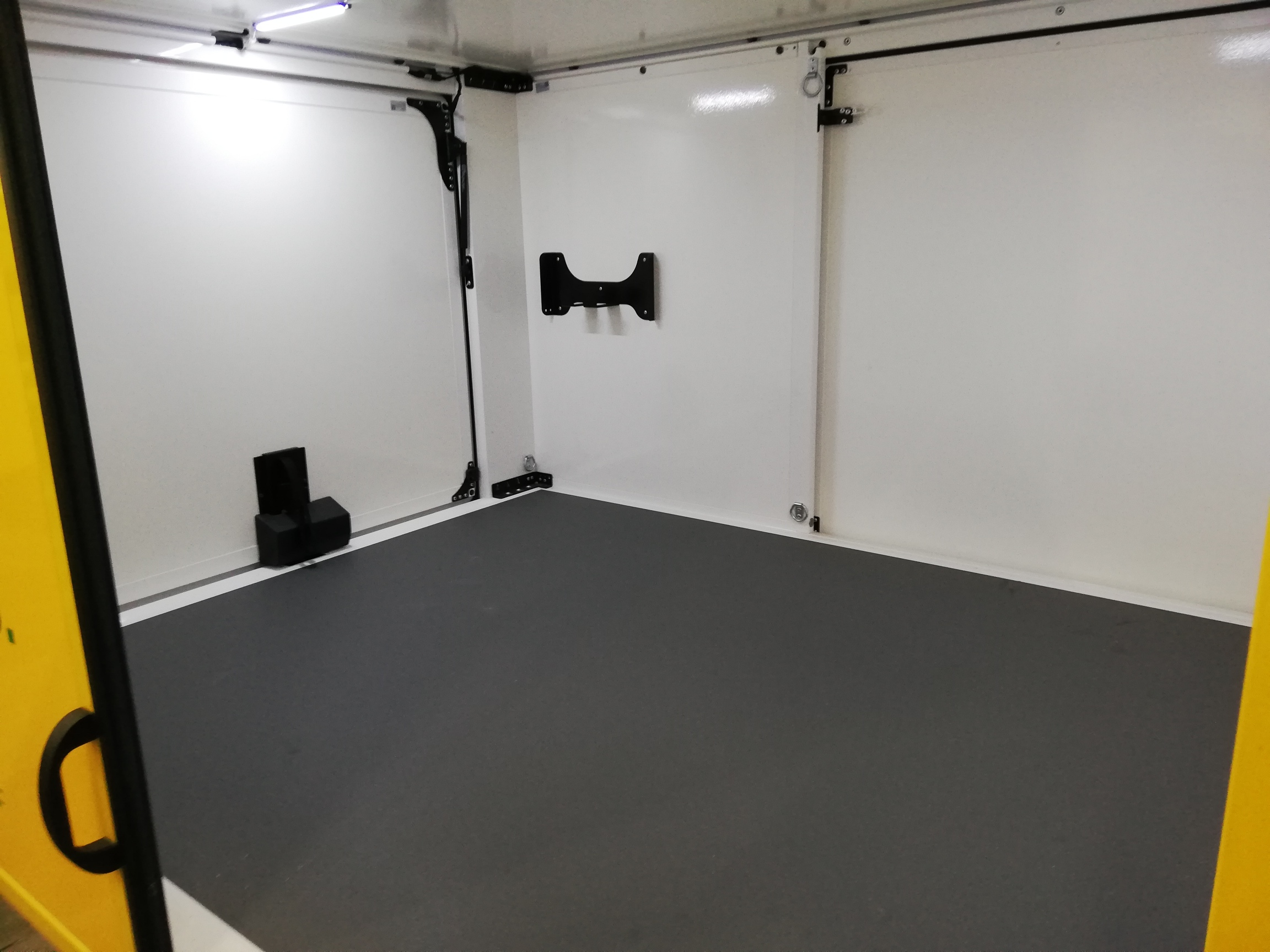 Diese Datei zeigt den Balungsraum des Koffers vom Fahrzeug StreetScooter Work L. Zu erkennen sind das offene Beladeportal von der Seite, der rutschfeste Boden sowie die weiteren (im Bild verschlossenen) Öffnungsmöglichkeiten.